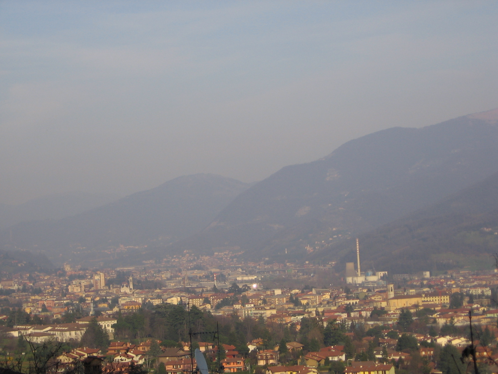 Bassa val Seriana, Bergamo, Italia